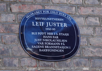 Minneplate over Leif Juster, tidligere Sagene brannstasjon, Sagv. 23C, Oslo